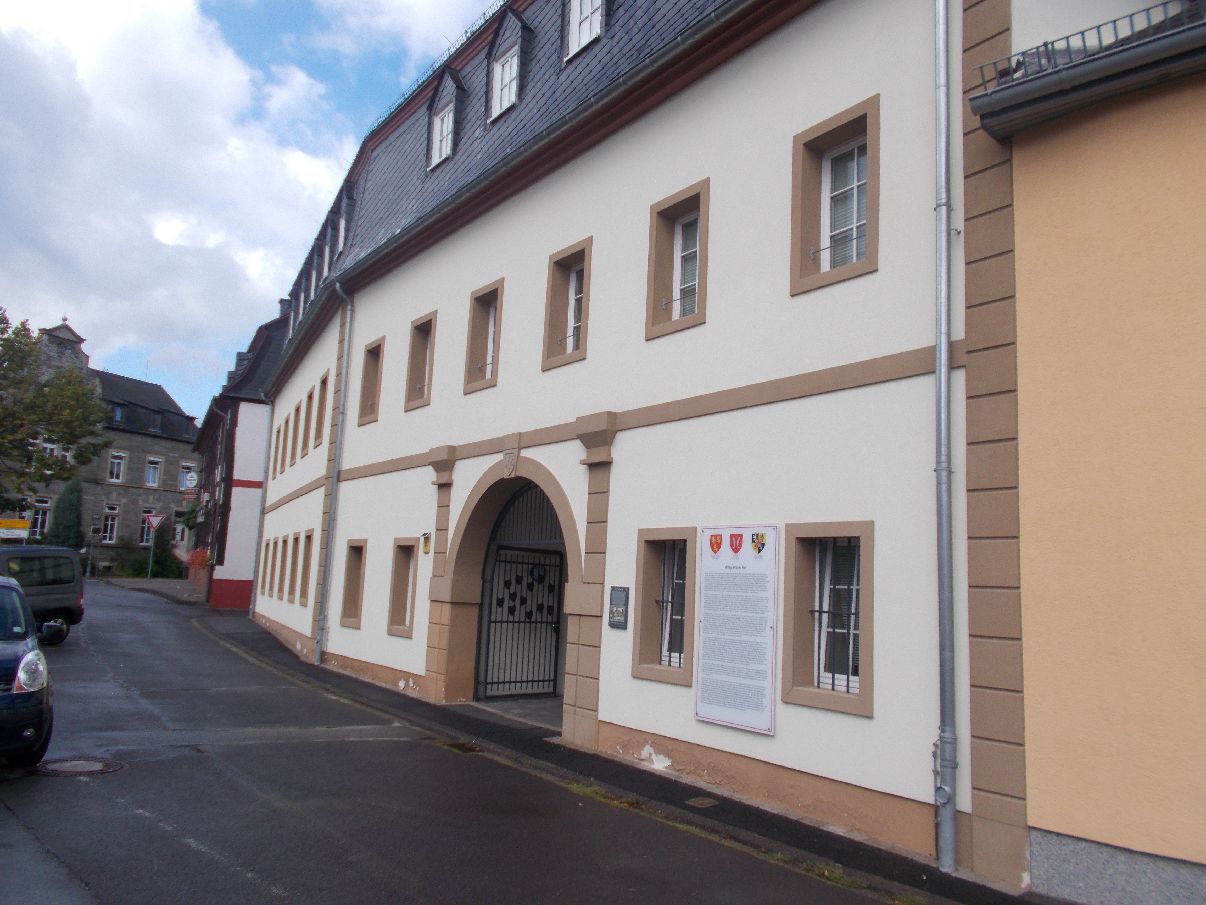 Putzbau mit Mansarddach, zweite Hälfte des 18. Jahrhunderts